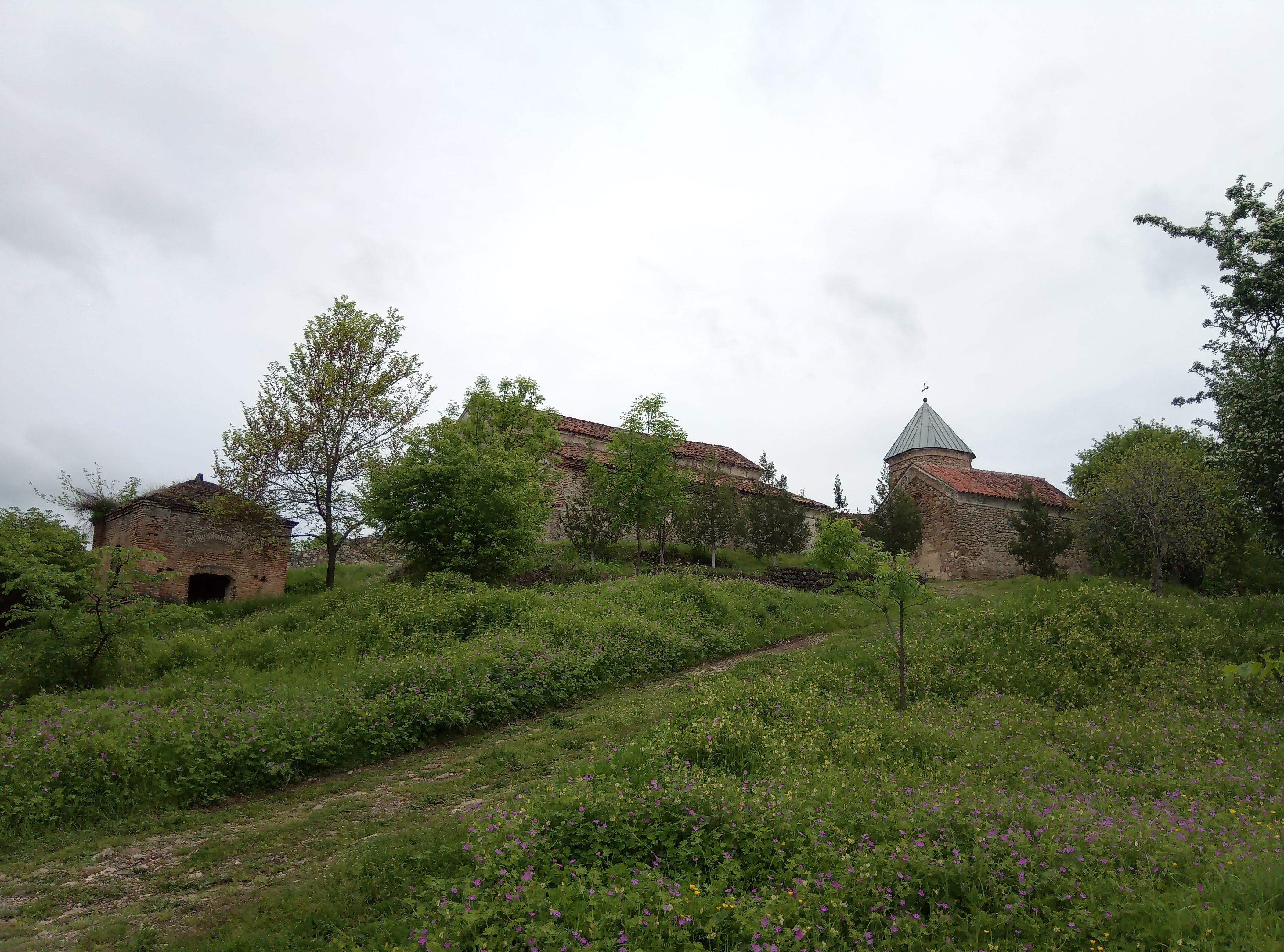 ვეჯინის ციხის კომპლექსი